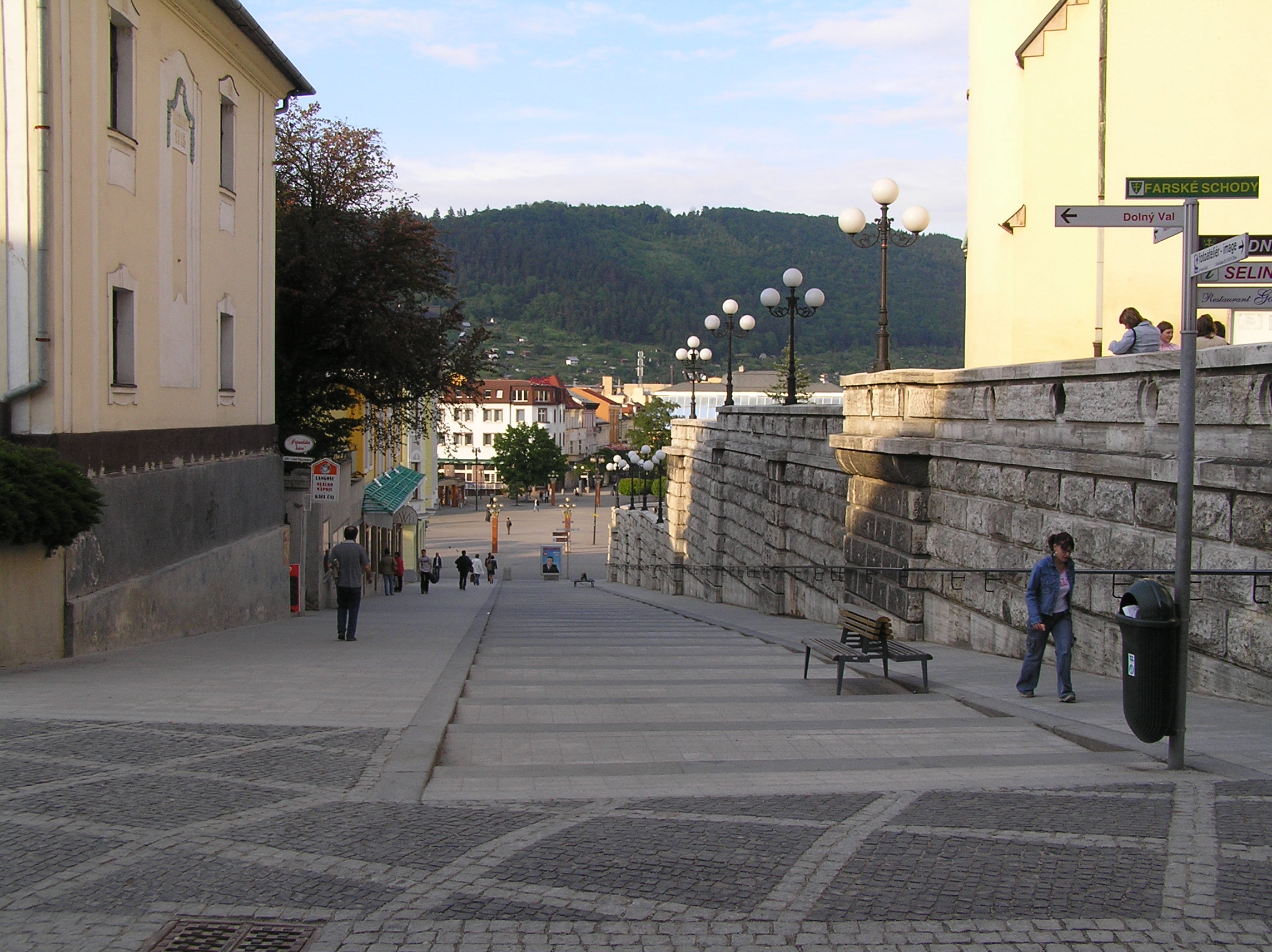 pohľad na Námestie Andreja Hlinku Farské schody, Žilina